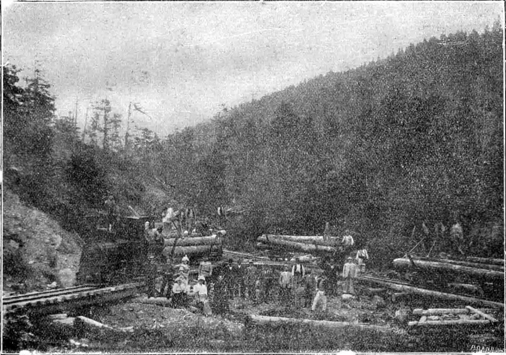 Calea ferată forestieră de pe valea Aţei (afluent al Tarcăului):transportul butucilor